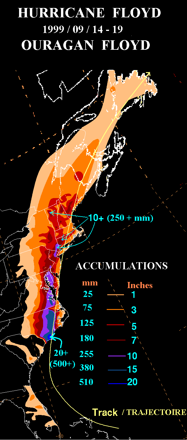 Rainfall from Hurricane Floyd (1999) / Accumulations de pluie avec l'ouragan Floyd